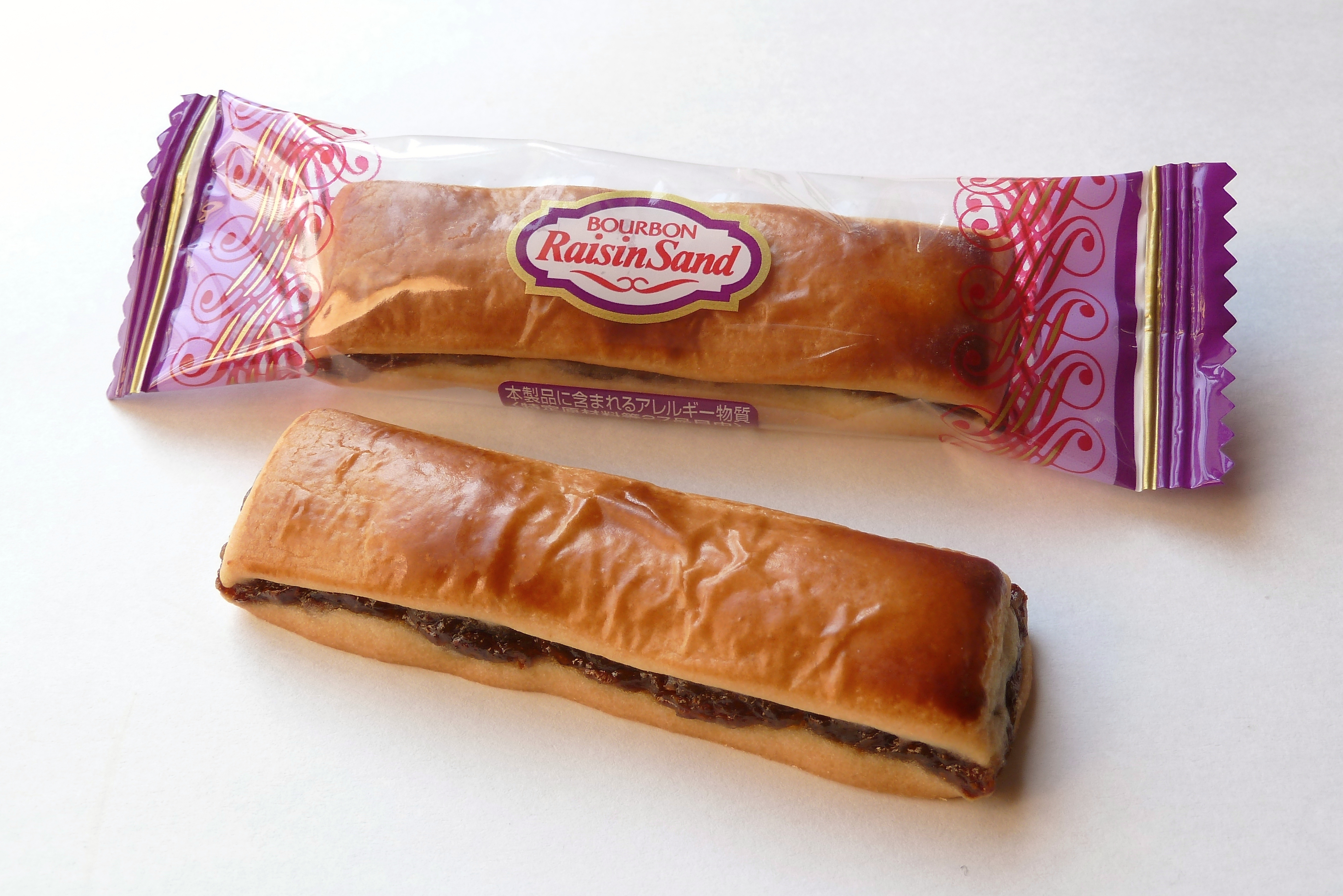 ブルボンが販売しているクッキー「レーズンサンド」